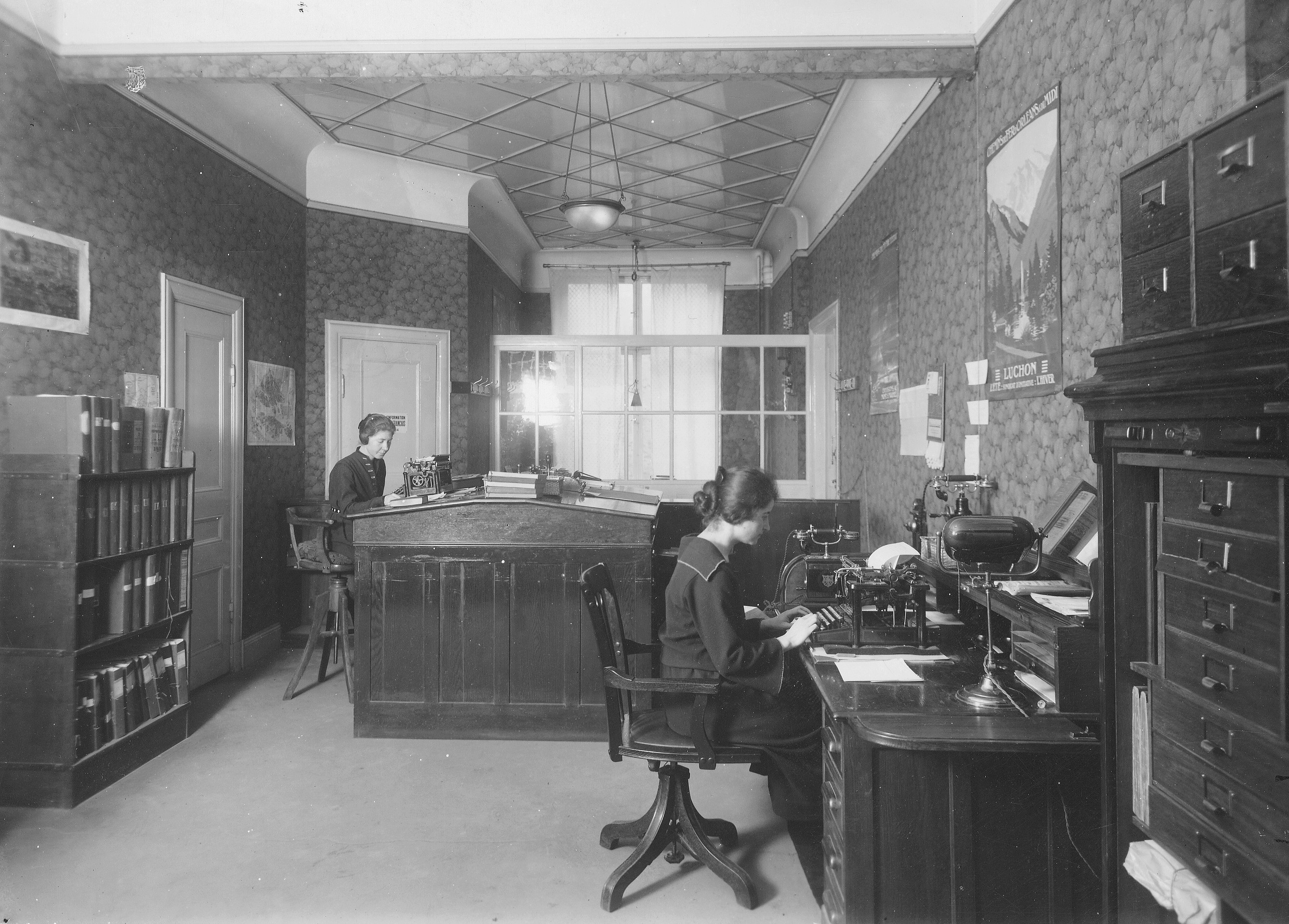 Franska handelskammaren, kontor, Drottninggatan 57